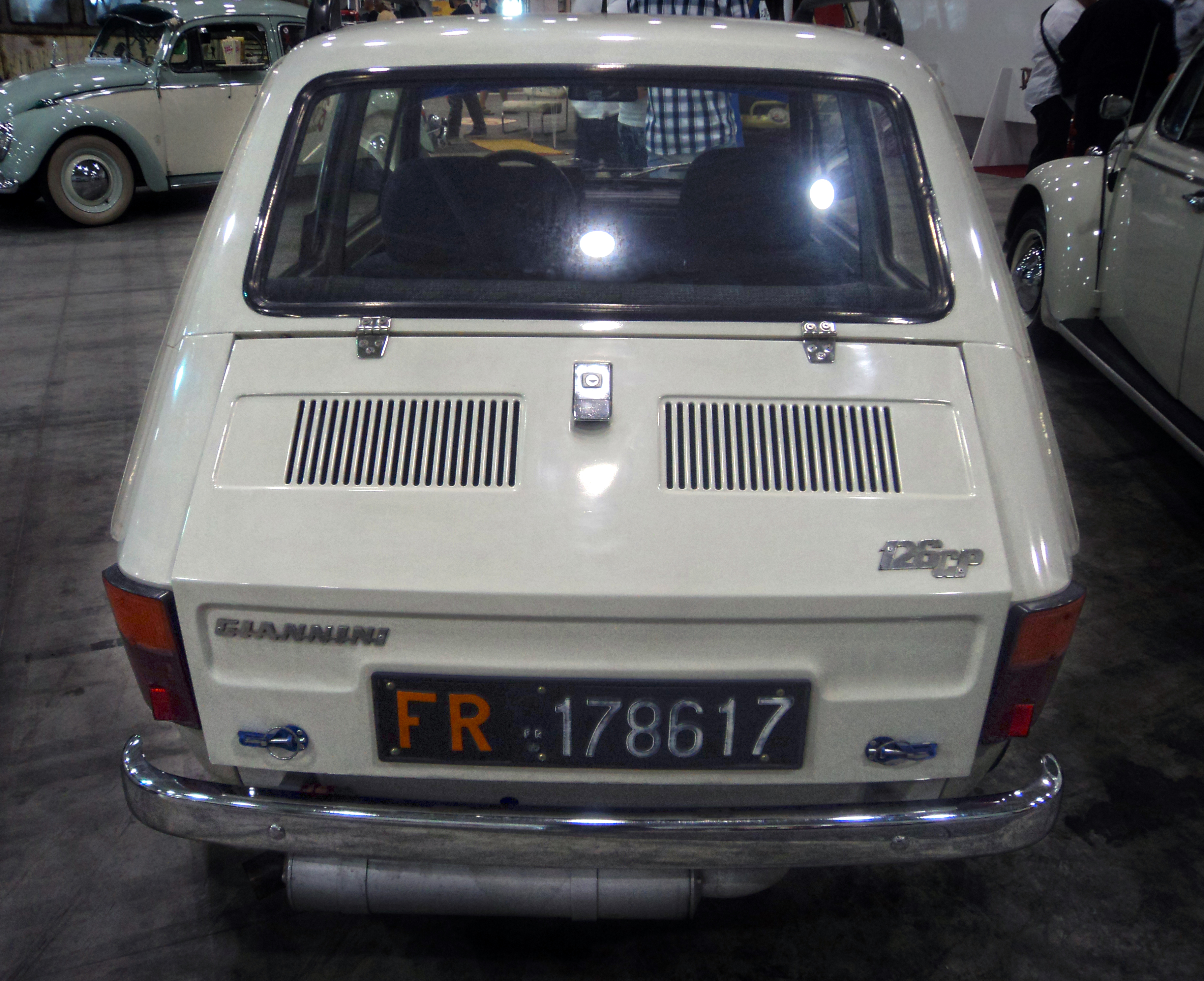 Fuoriserie 2014